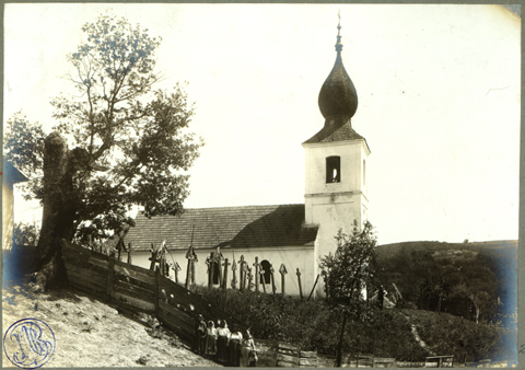 Adler - Biserica greco-catolică din Silvaş, jud. Hunedoara